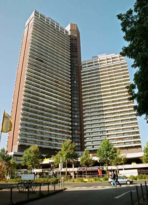 Unicenter Köln-Sülz